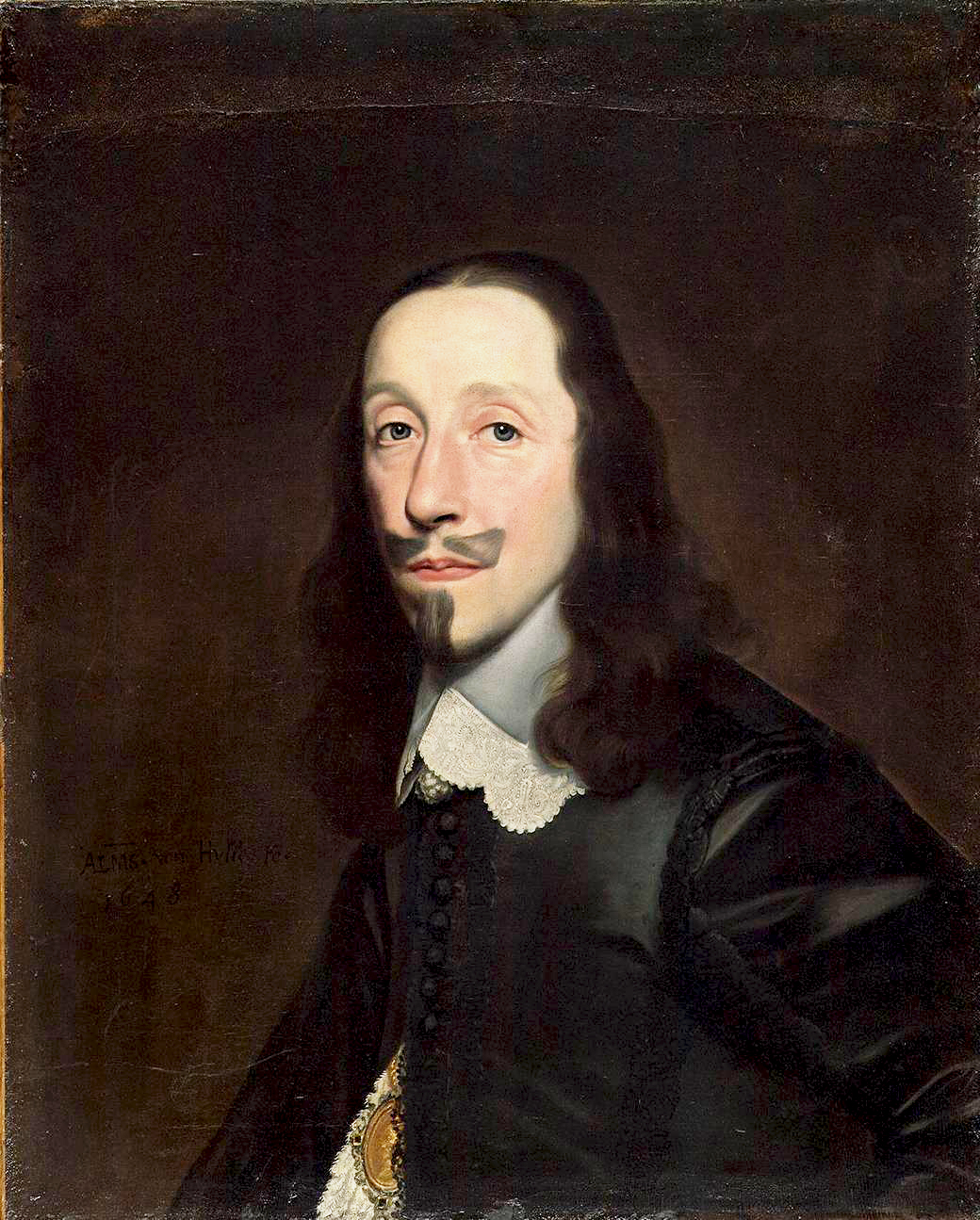 Portrait von Heinrich Langenbeck von Anselmus von Hulle (1601-1674) DasOriginalbefindet sich in der Staatsbibliothek Hamburg